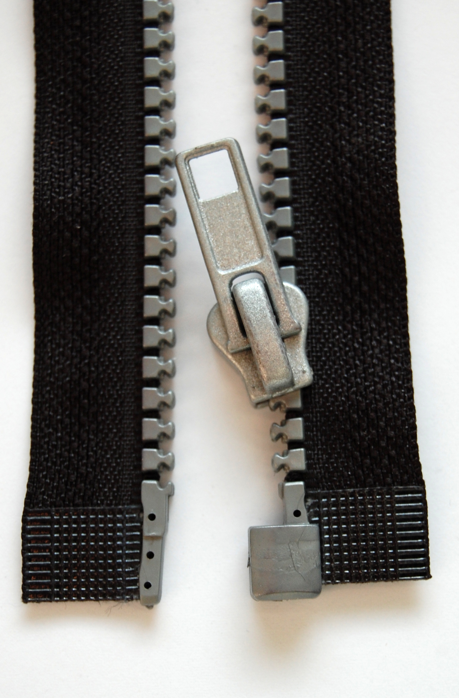 teilbarer Reißverschluss geöffnet